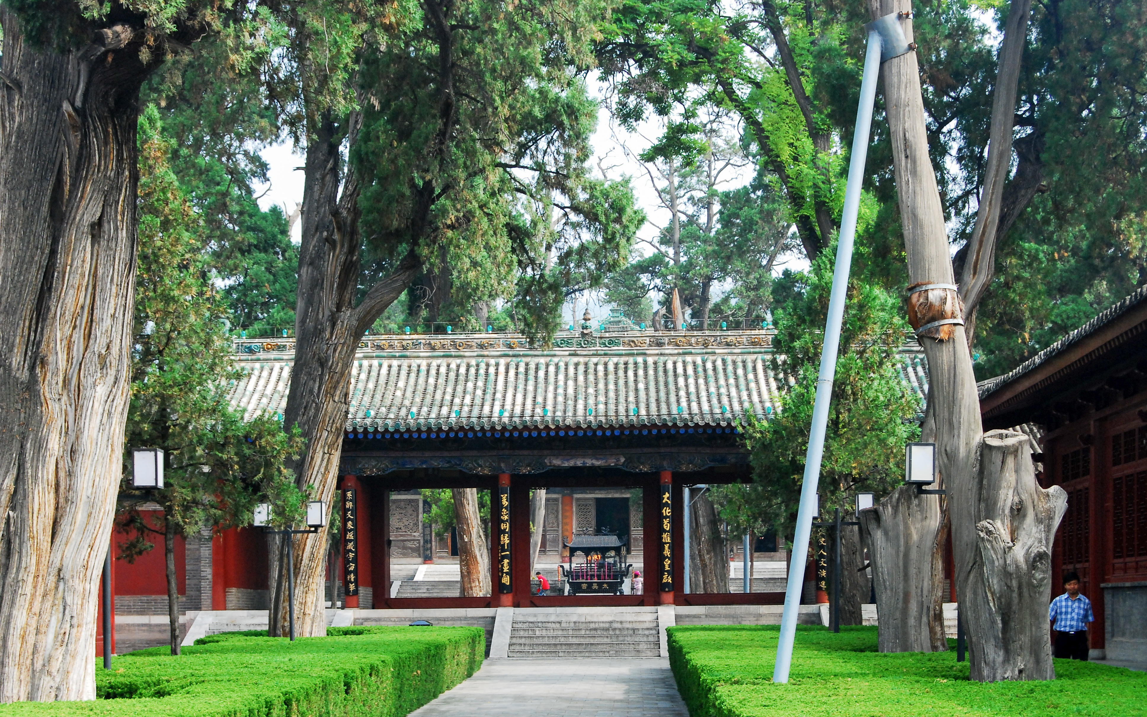 中文（中国大陆）: 天水伏羲庙内